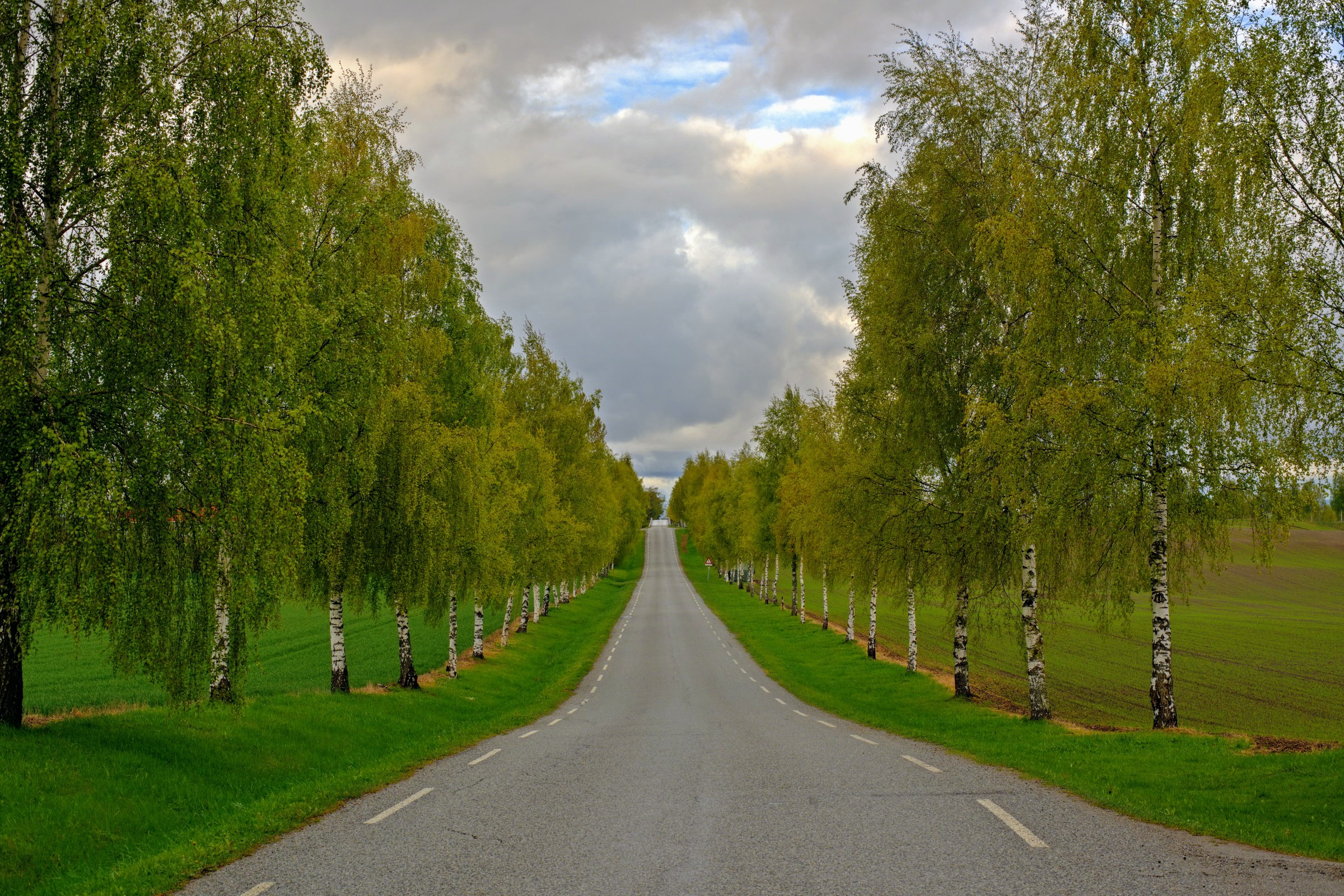 Fylkesvei 456 (Akershus)